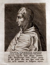 Edigio Albornoz / Gil Alvarez de Albornoz